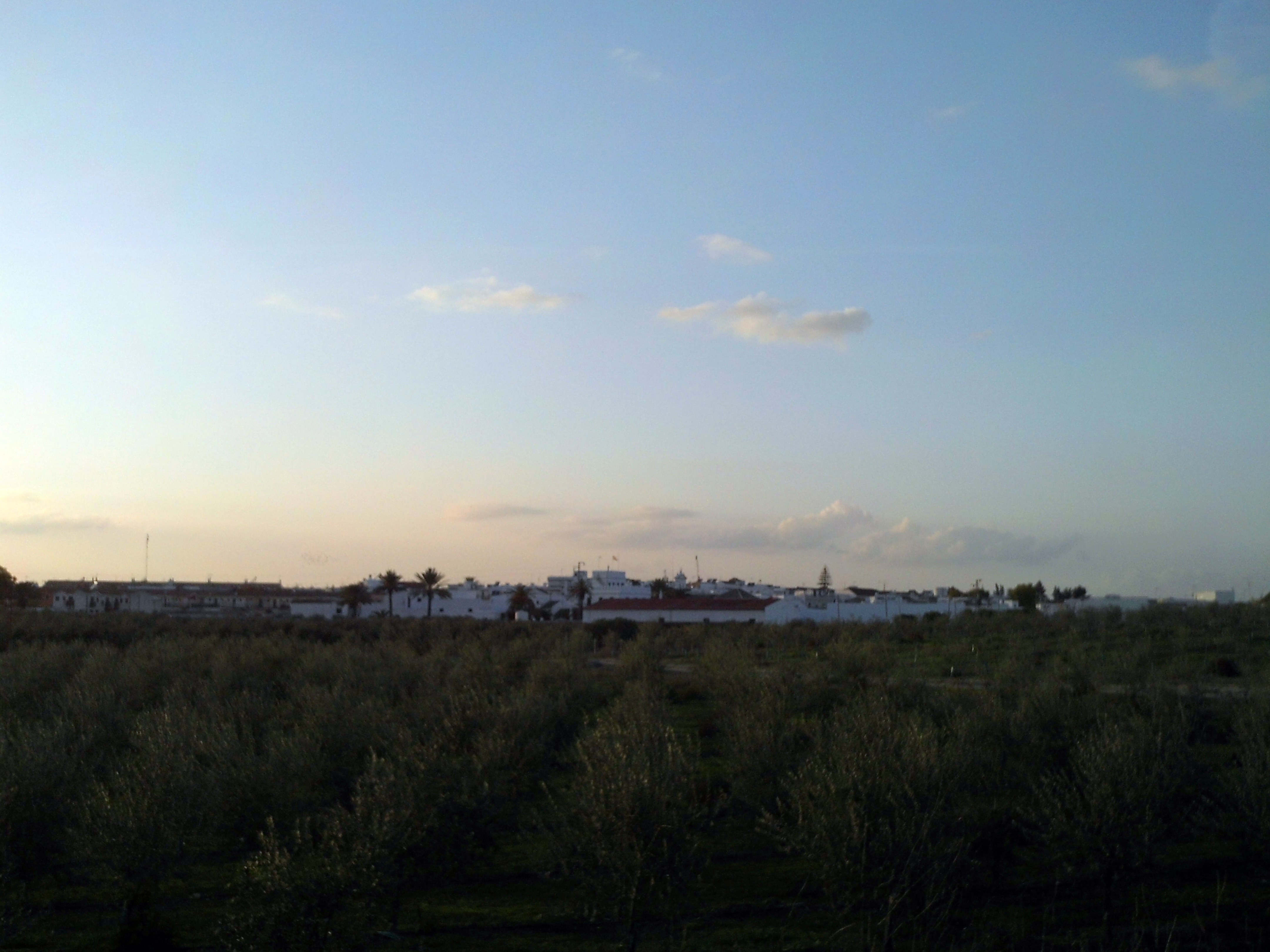 Almensilla, provincia de Sevilla, Andalucía, España.